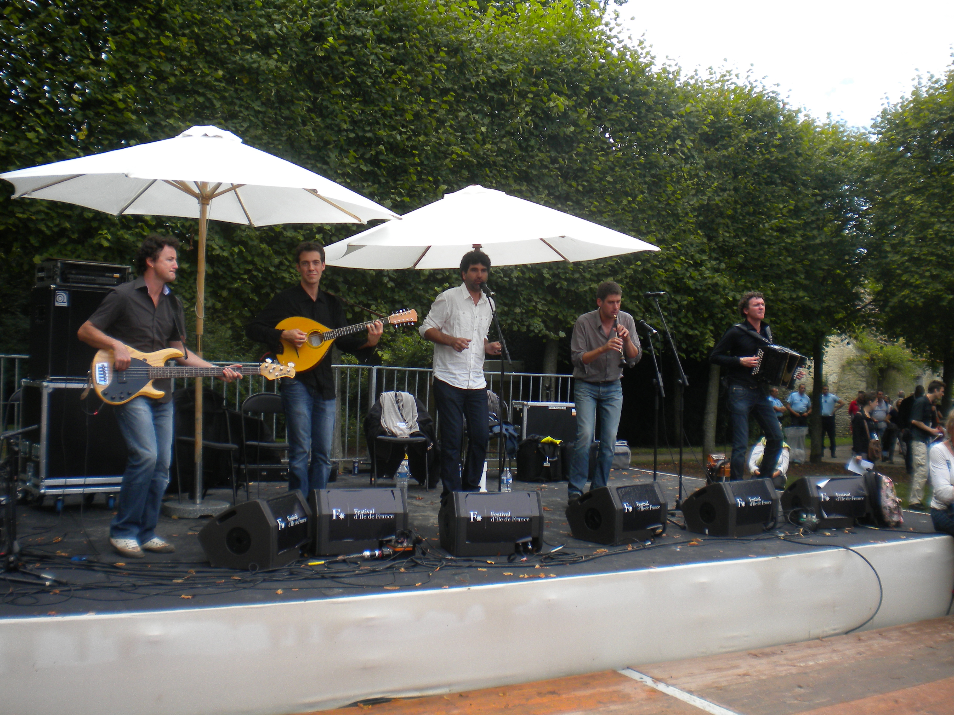 Brou HamonQuimbert 2011 09 04 Villarceaux